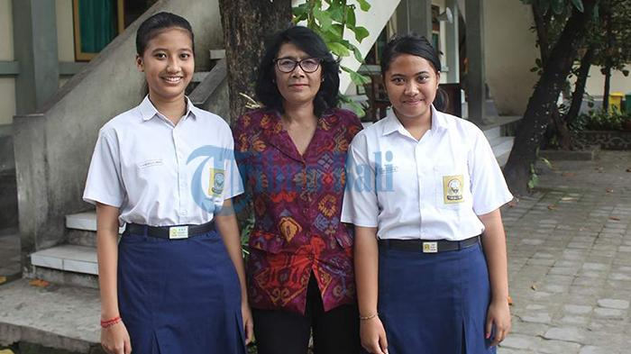 Dua sahabat yang tampil sebagai peraih nilai UN Tingkat SMP/MTS 2015 tertinggi se Bali.